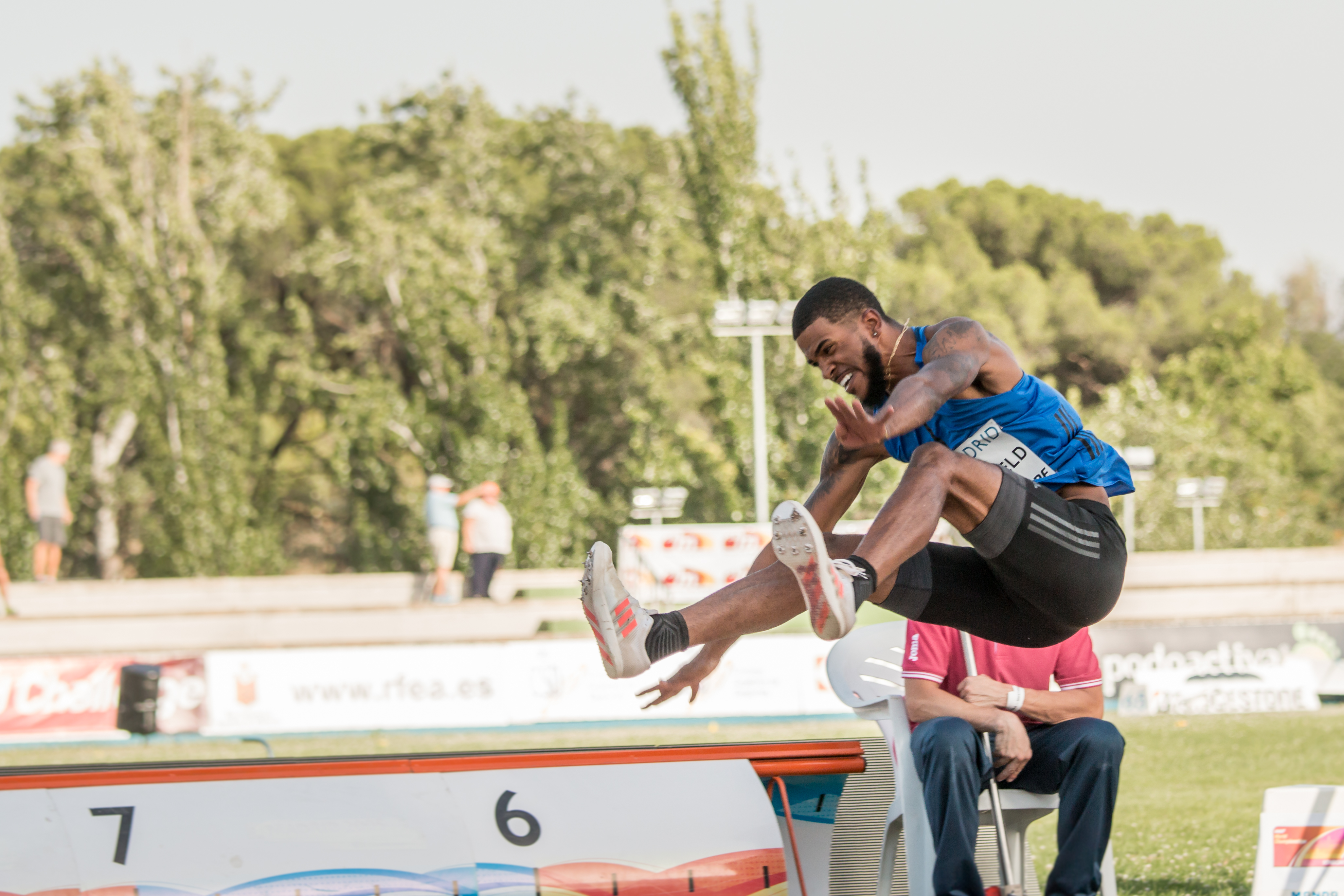 Michael Hartfield (USA). Salto en largo. IAAF World Challenge. Meeting Madrid 2017. Moratalaz, Madrid.